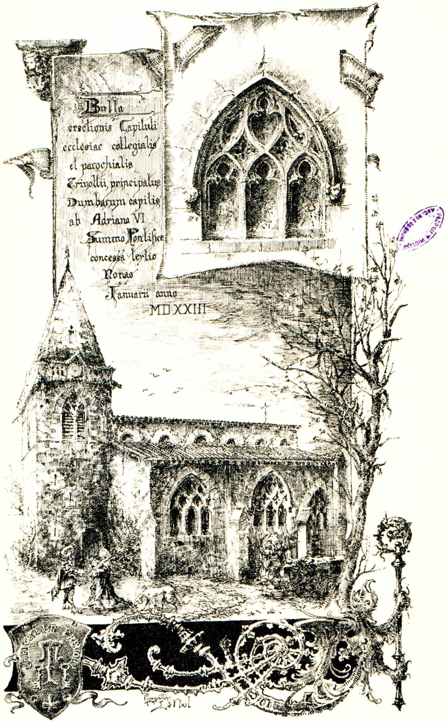 Extrait de P. Lenail, Le Parlement des Dombes, 1900, page 87. ADRML. Le dessin représente la collégiale avec son clocher primitive, celui qui existe aujourd'hui est postérieur à 1794.